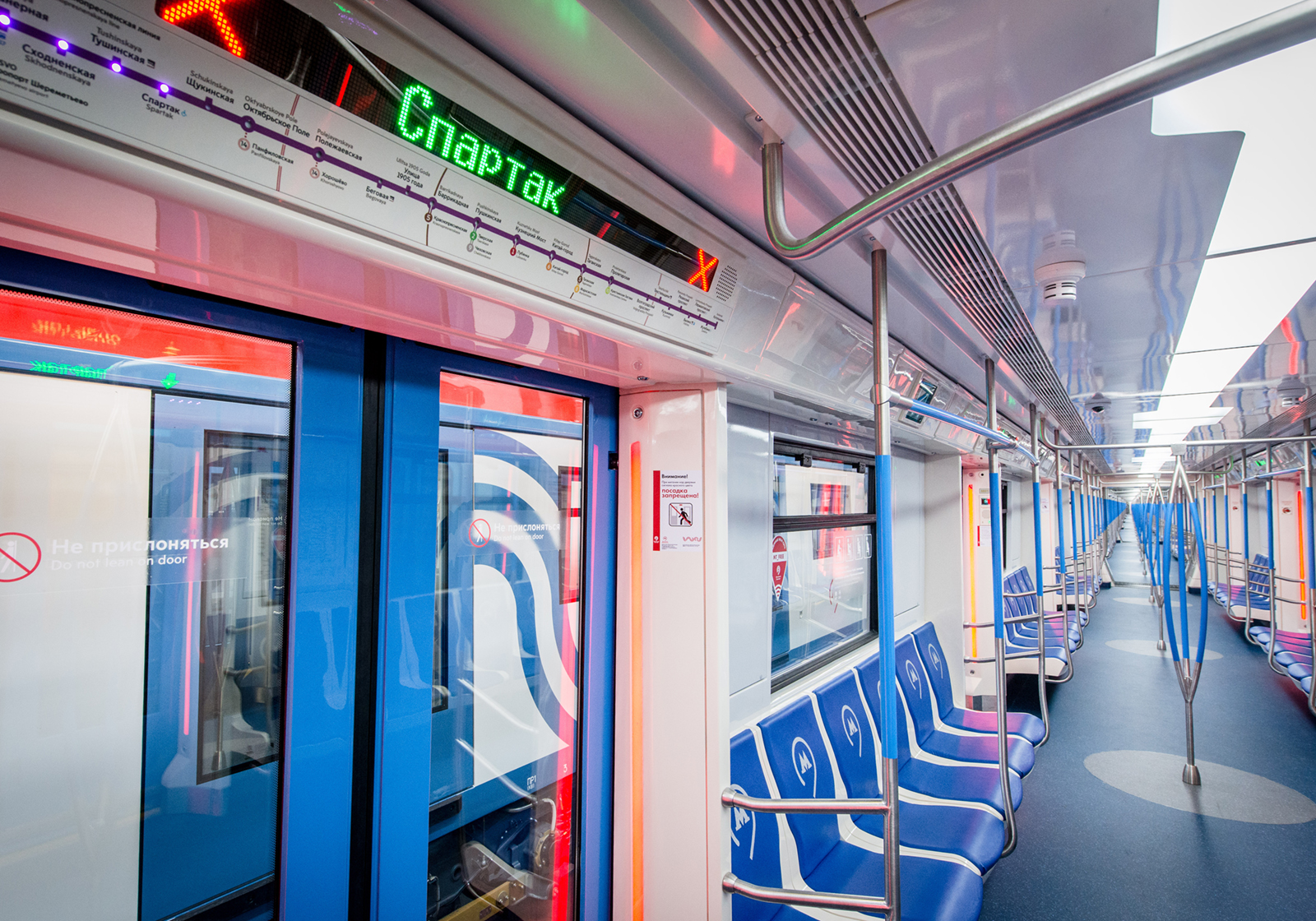 Салон электропоезда метро 81-765/766/767 «Москва». Двери и сиденья